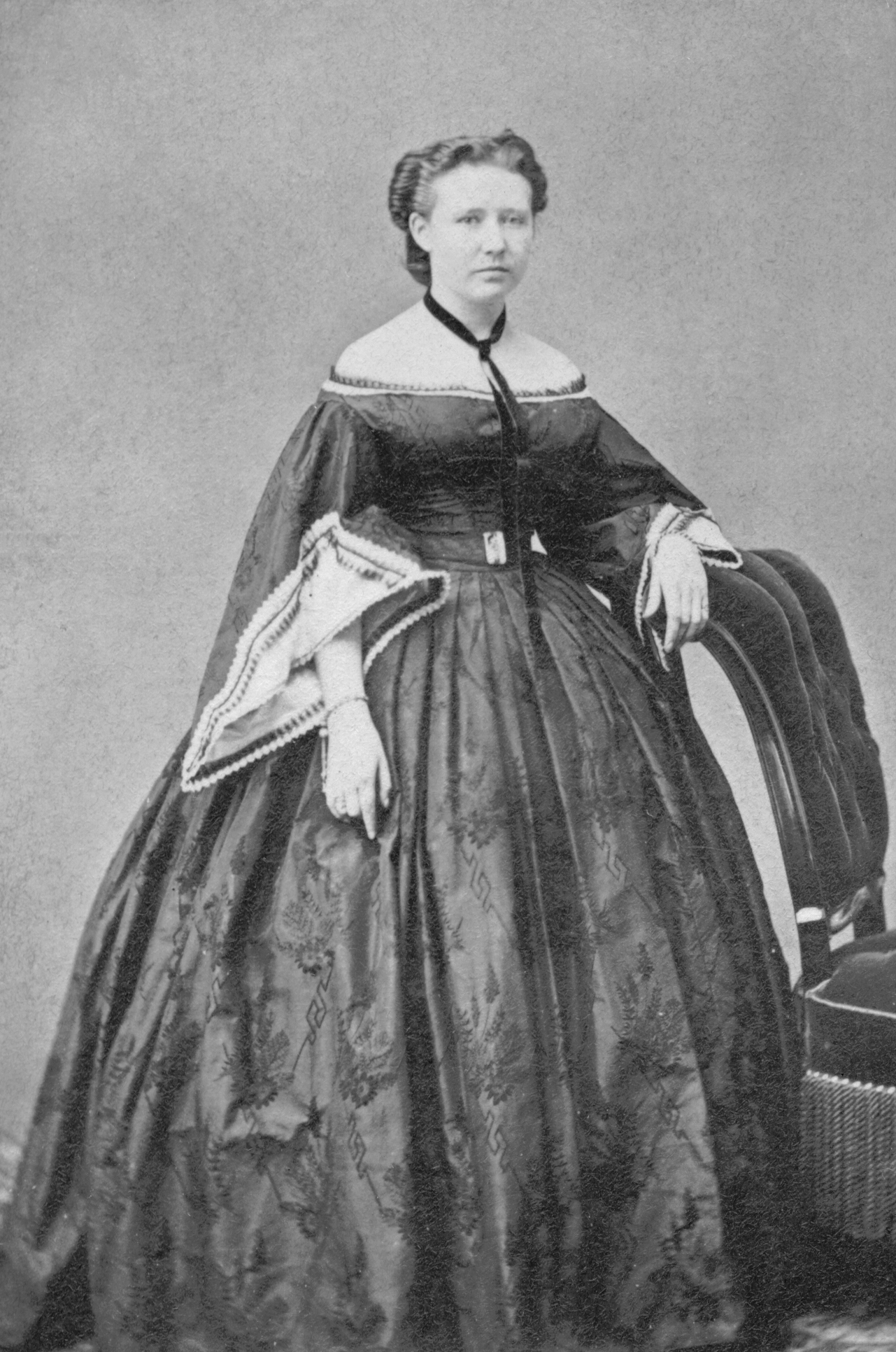 Hanna Styrell, skådespelare 1862